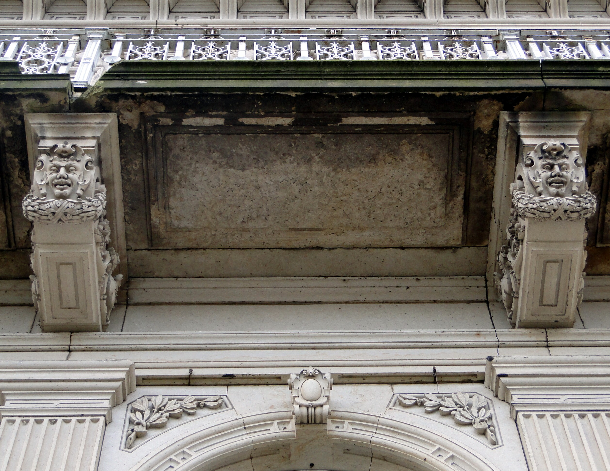 Detail der Villa Hartmann im Dresdner Stadtteil Laubegast